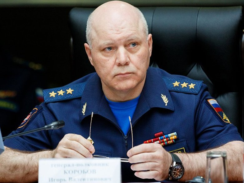 Начальник Главного управления Генерального штаба Вооруженных Сил Российской Федерации – заместитель начальника Генерального штаба Вооруженных Сил Российской Федерации генерал-полковник Коробов Игорь Валентинович